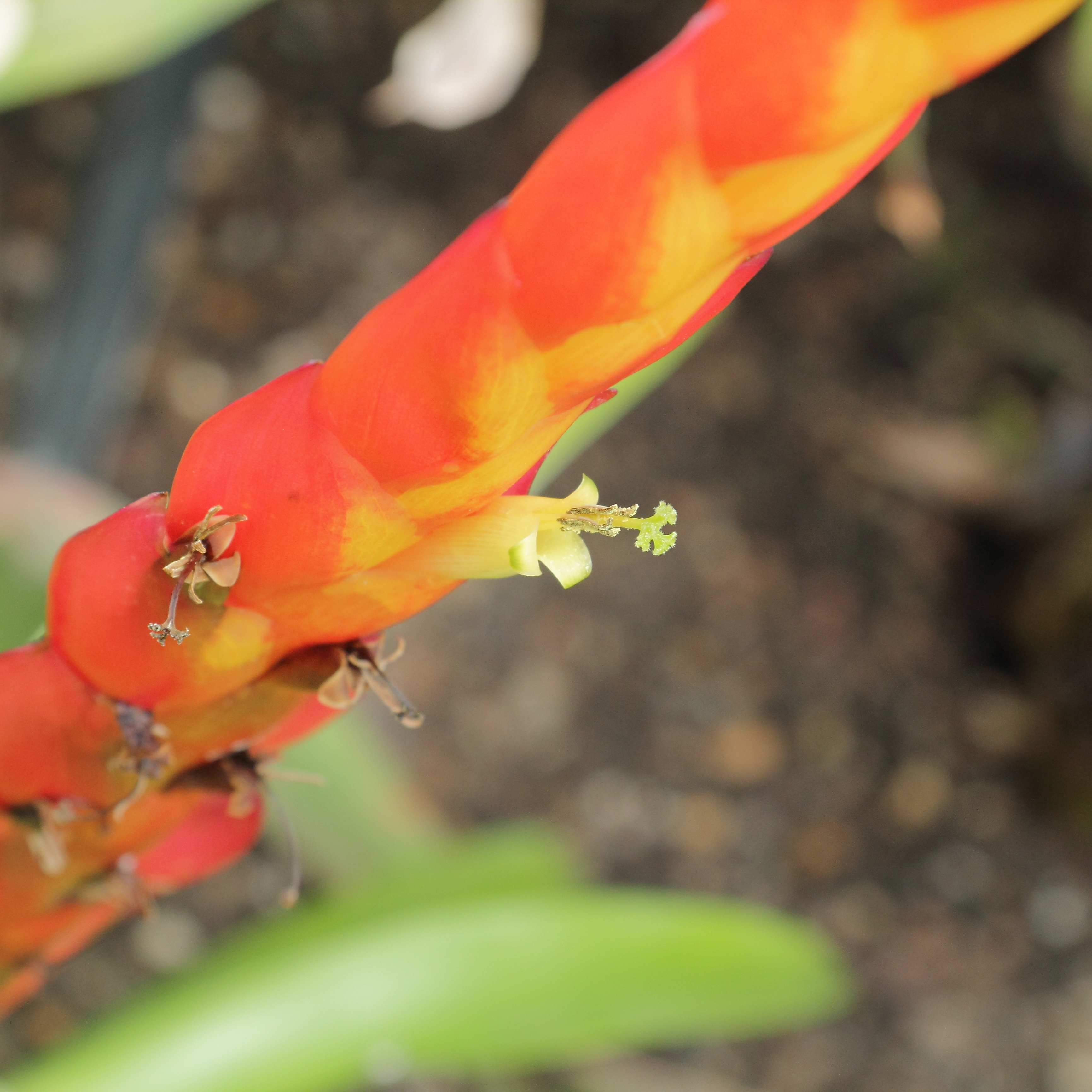 Vriesea duvaliana, identifierad med hjälp av befintlig skylt vid Kew Gardens, London.